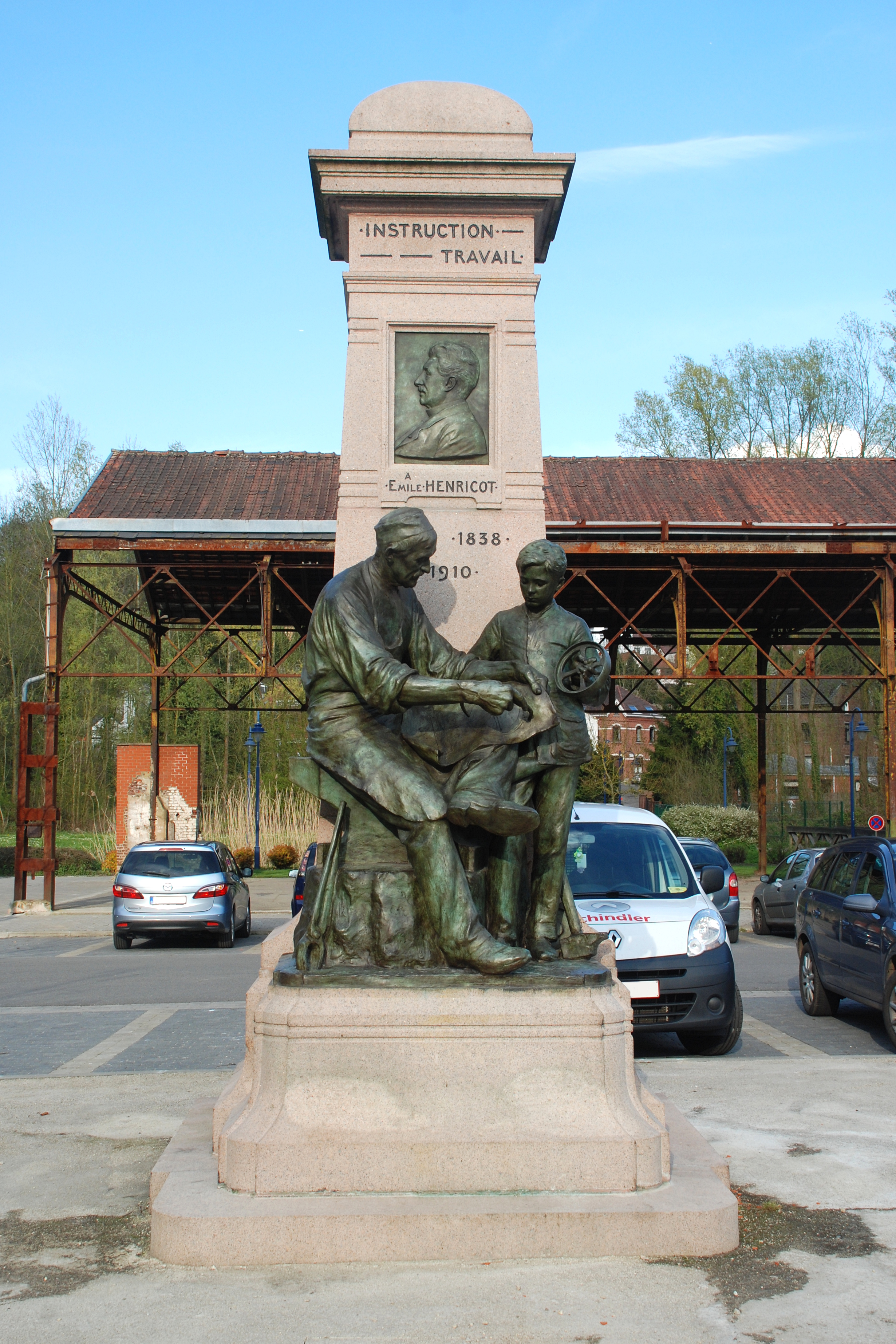 Belgique - Brabant wallon - Court-Saint-Etienne - Monument à Émile Henricot